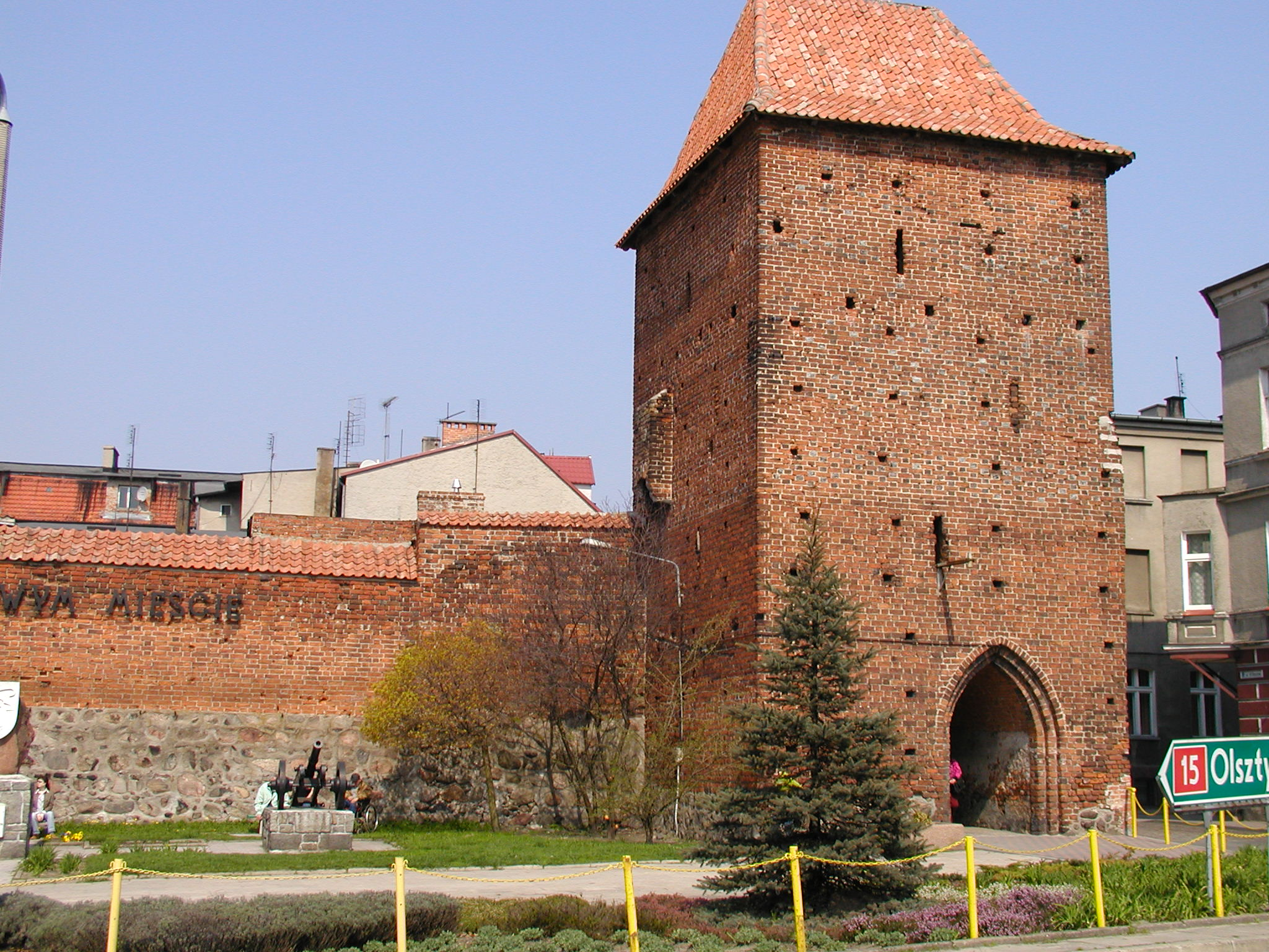 Baszta Brodnicka Nowe Miasto Lubawskie, Nowe Miasto Lubawskie (gmina miejska)